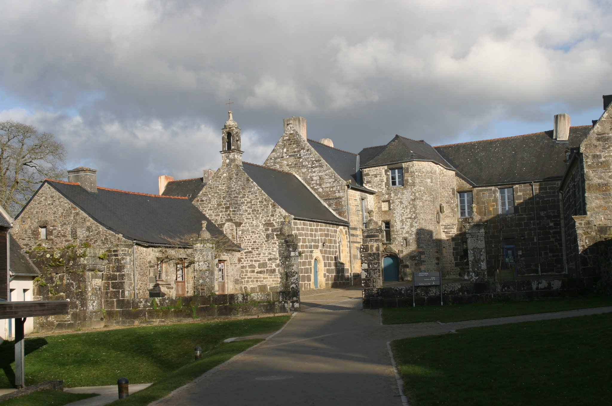 Manoir de Kerliver